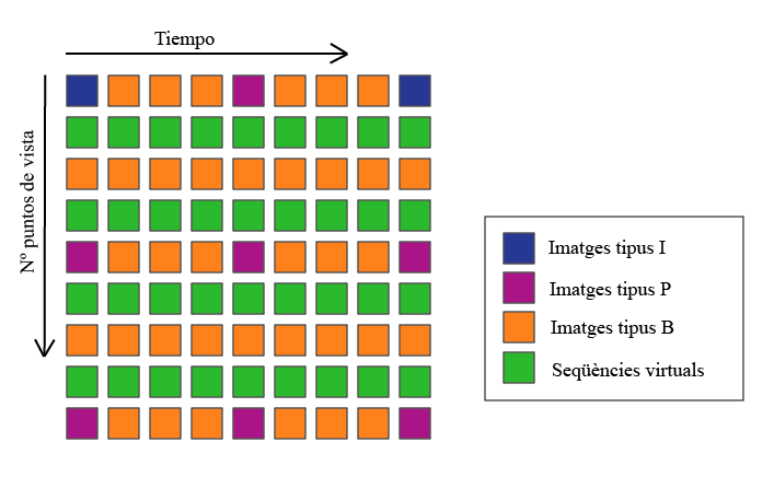 Patrón de codificación usando imágenes tipo I, B i P.